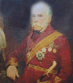 James Holmes Schoedde